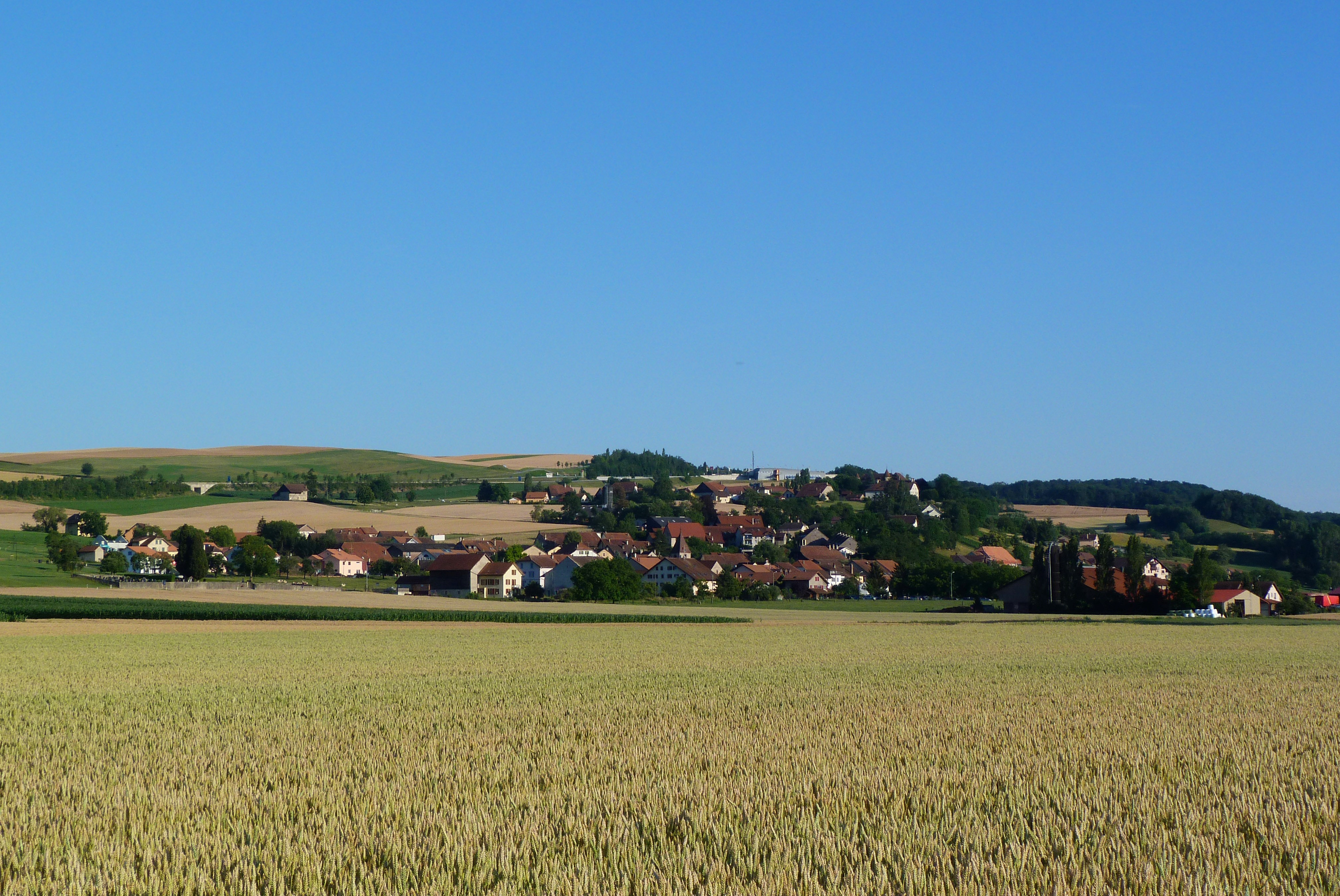 Village de Bavois